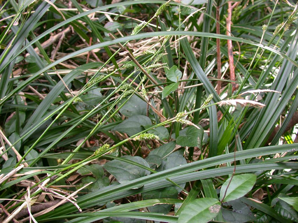 2004/04/11 和歌山県田辺市：Tanabe City. Wakayama Pref. Japan